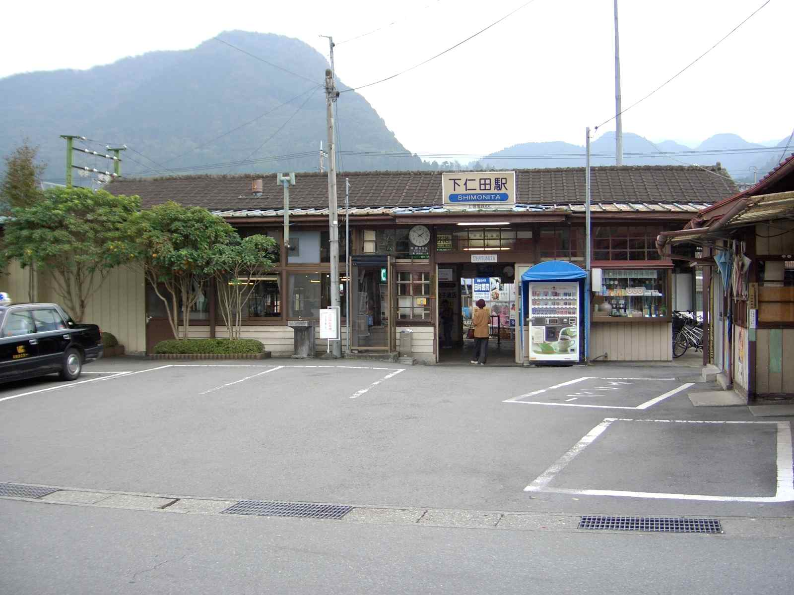 上信下仁田駅。撮影者：ＰＹＯＮＣＨＩ